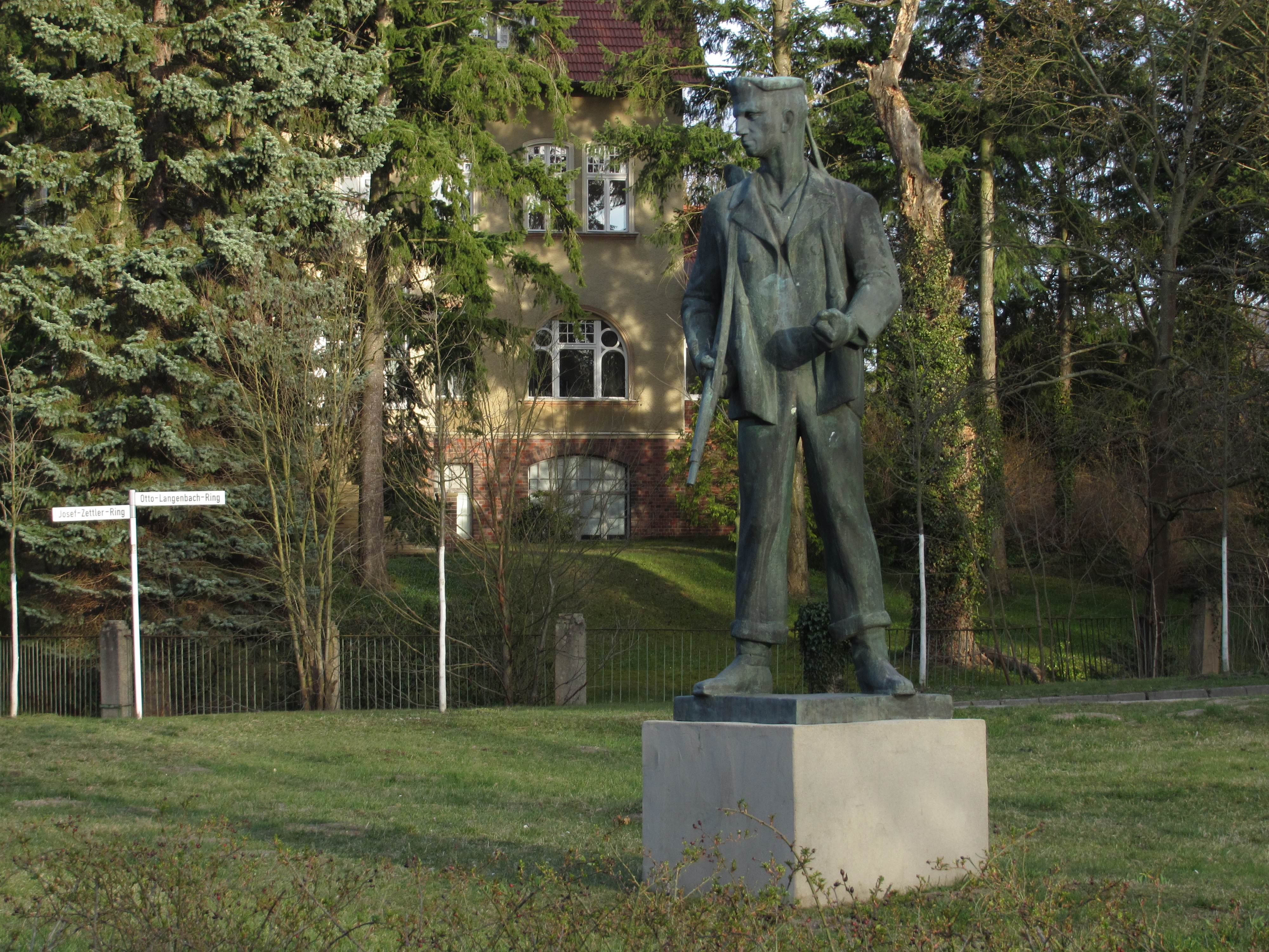 "Der Rote Matrose" (Roter Matrose), Hans Kies, Bronze, Strausberg-Stadt, Grünfläche an der Ecke: Otto-Langenbach-Ring/An der Stadtmauer/Josef-Zettler-Ring [Ein weiterer Guss (1960) der Skulptur steht vor dem Friedhof der Märzgefallenen in Berlin-Friedrichshain Volkspark Friedrichshain (Eingang) (Quelle